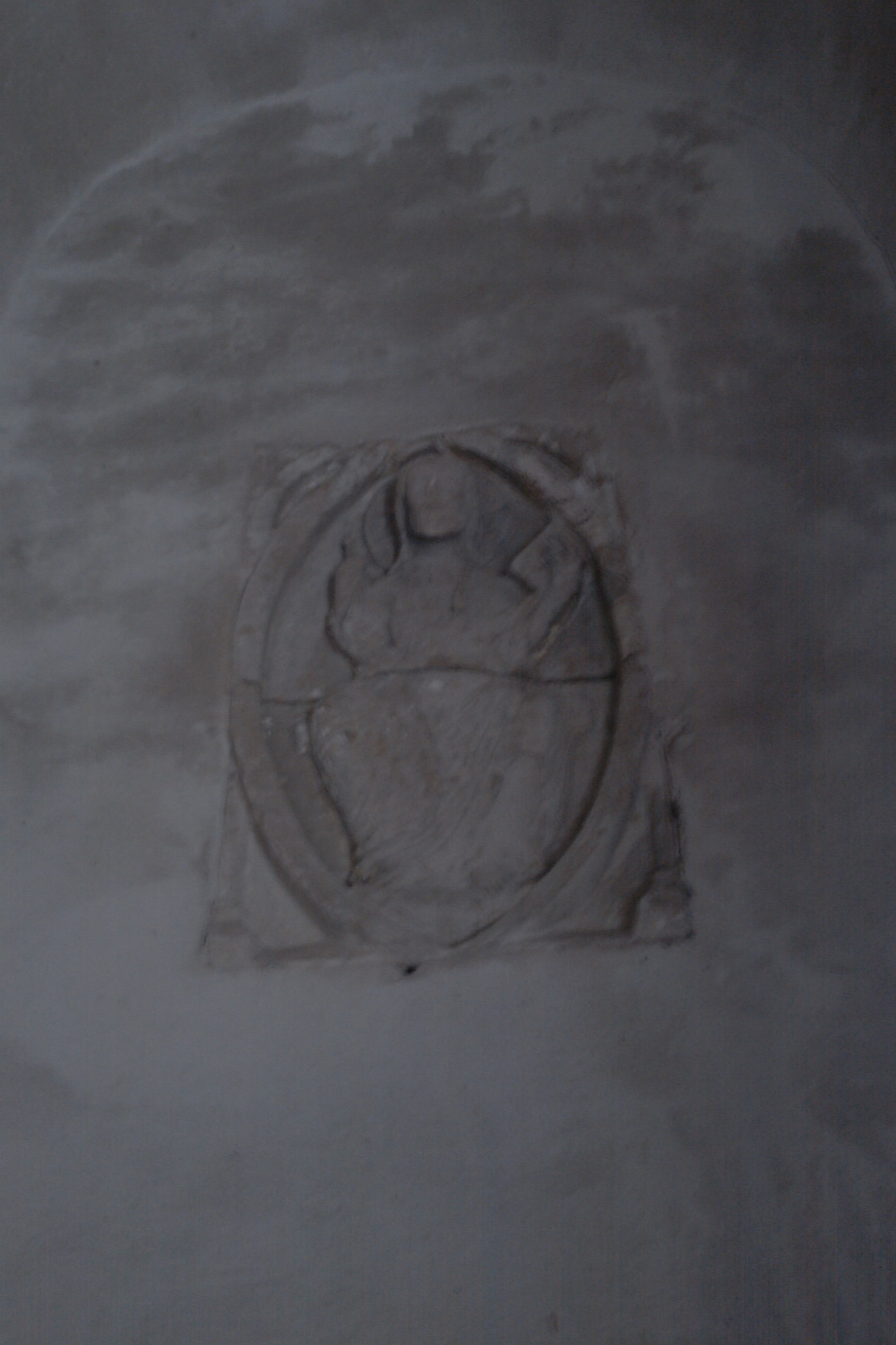 Bas relief du XVe situé dans la nouvelle église